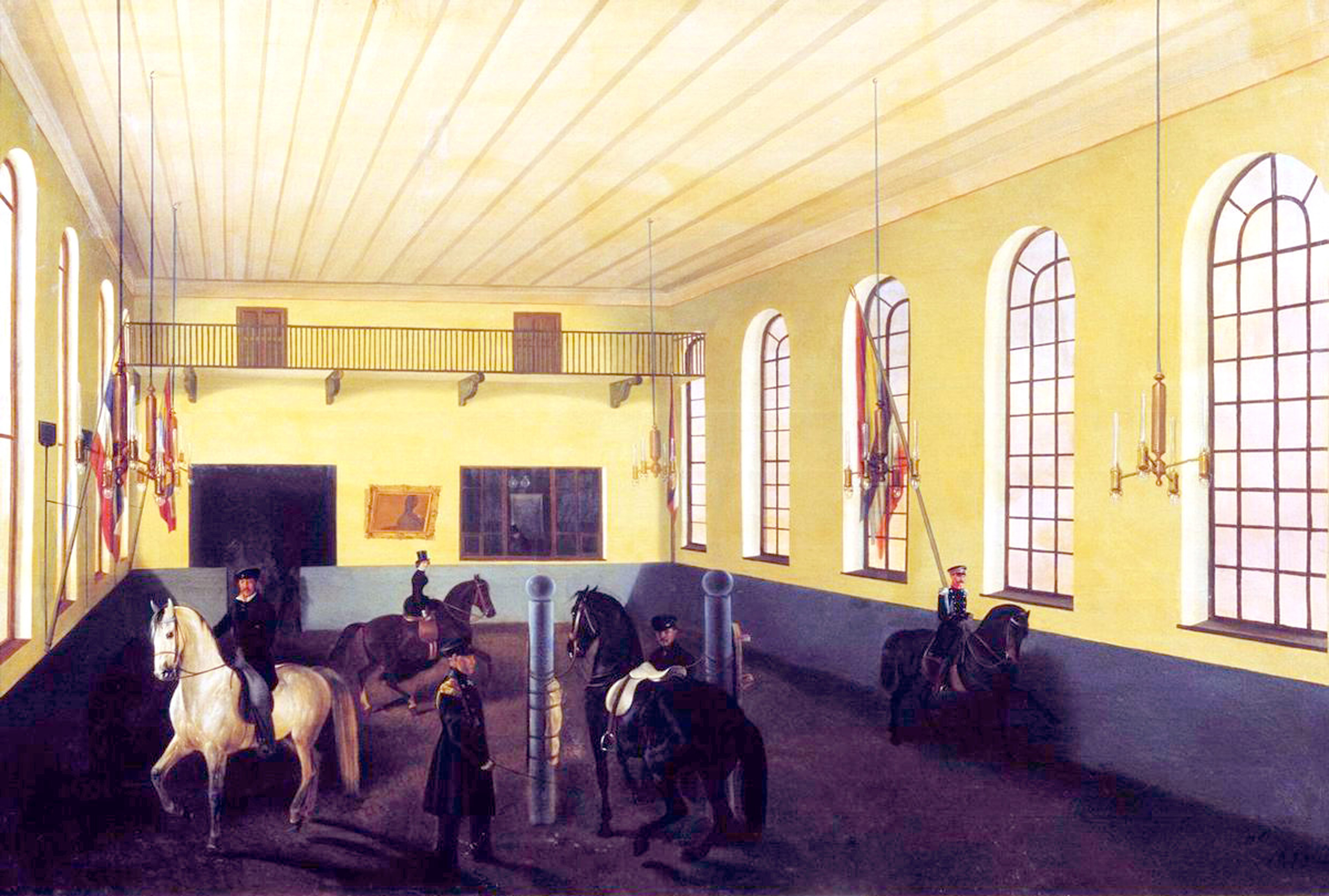 Никол Егорович Сверчков. в Манеже 1853 год